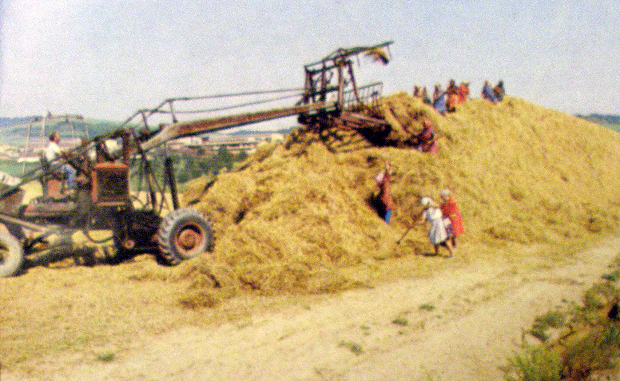 Nakladač slamy pri žatve rok 1985 Sedlice okres Prešov